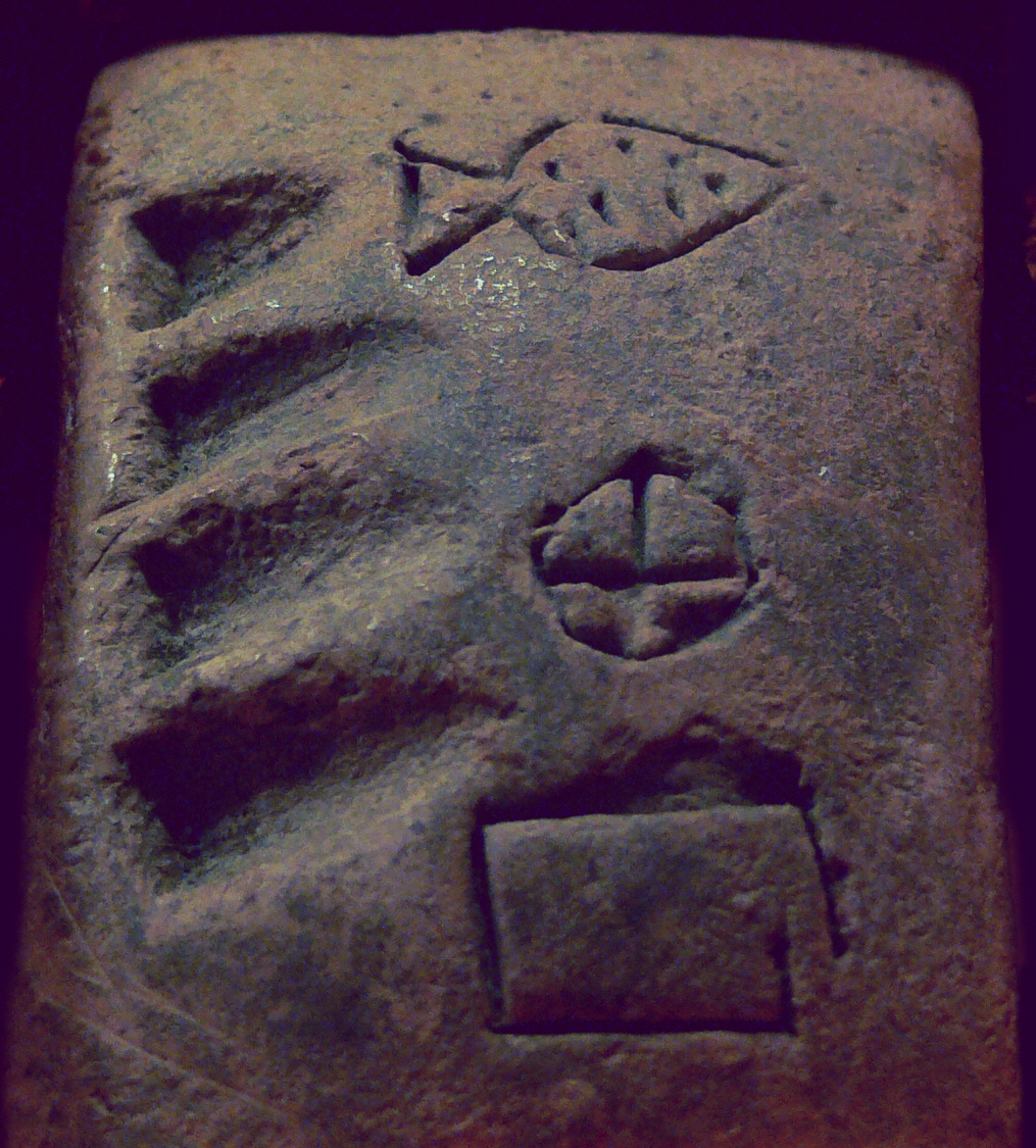 Tontäfelchen aus Mesopotamien, 3200 v. Chr., Verwaltungstext aus Uruk (links: Zahlzeichen 4, rechts: drei Eintragungen) Staatliche Museen zu Berlin, Vorderasiatisches Museum, VAT 14674 Fotografiert in der Ausstellung "Am Anfang war das Formular", Museum für Kommunikation Frankfurt, 2008